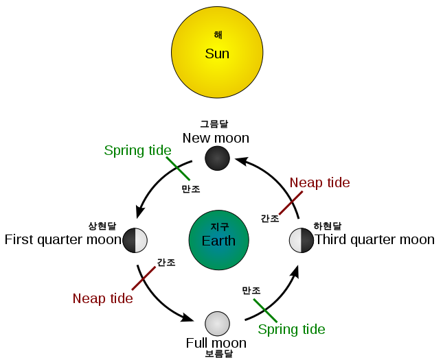 달과 조수의 관계